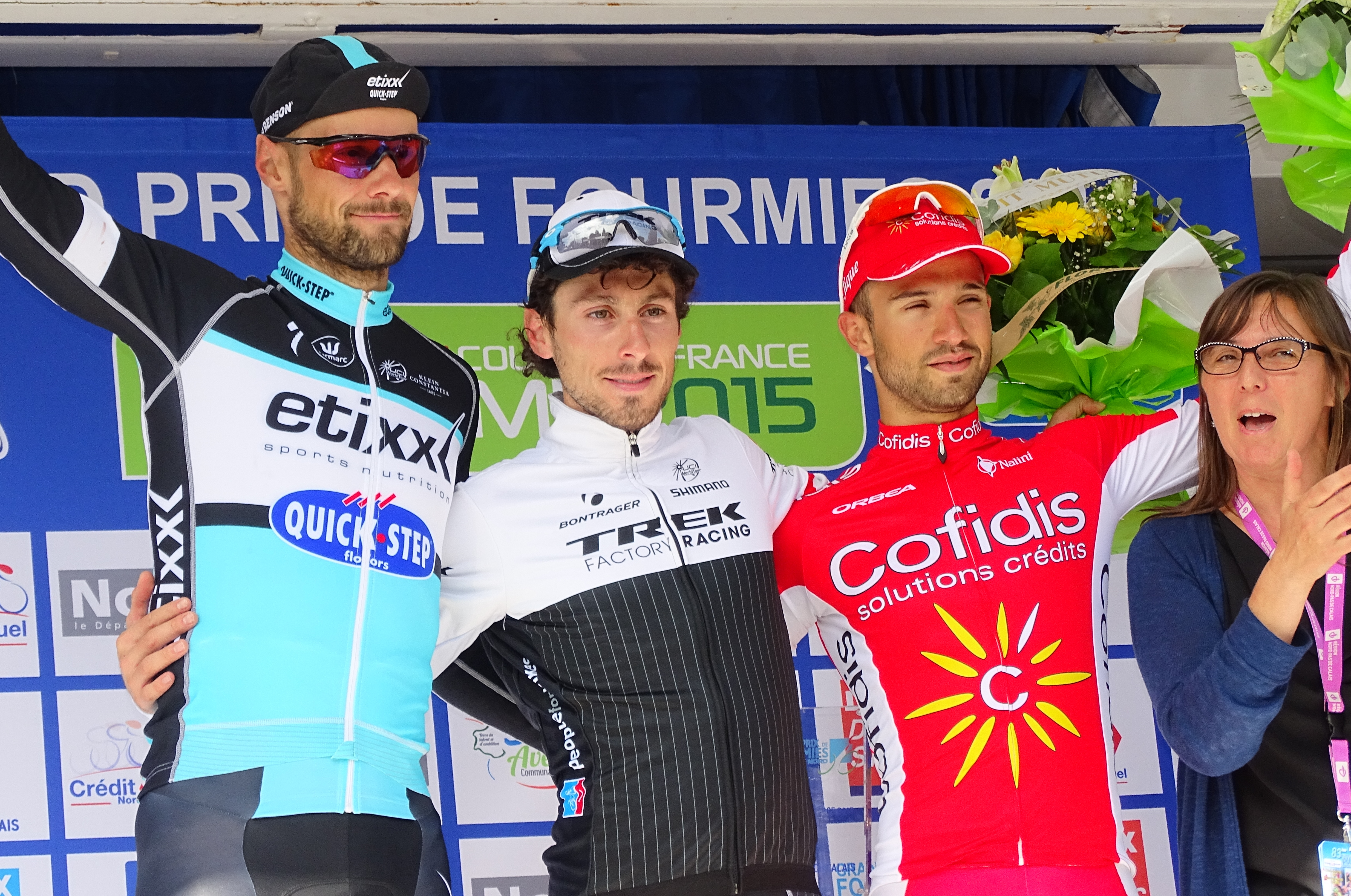 Reportage réalisé le dimanche 6 septembre à l'occasion du départ et de l'arrivée du Grand Prix de Fourmies 2015 à Fourmies, Nord-Pas-de-Calais, France.